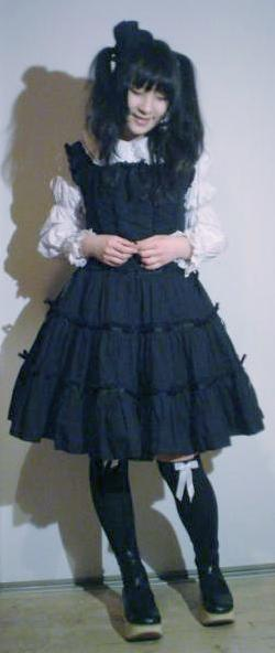 Gosuloli stereotype